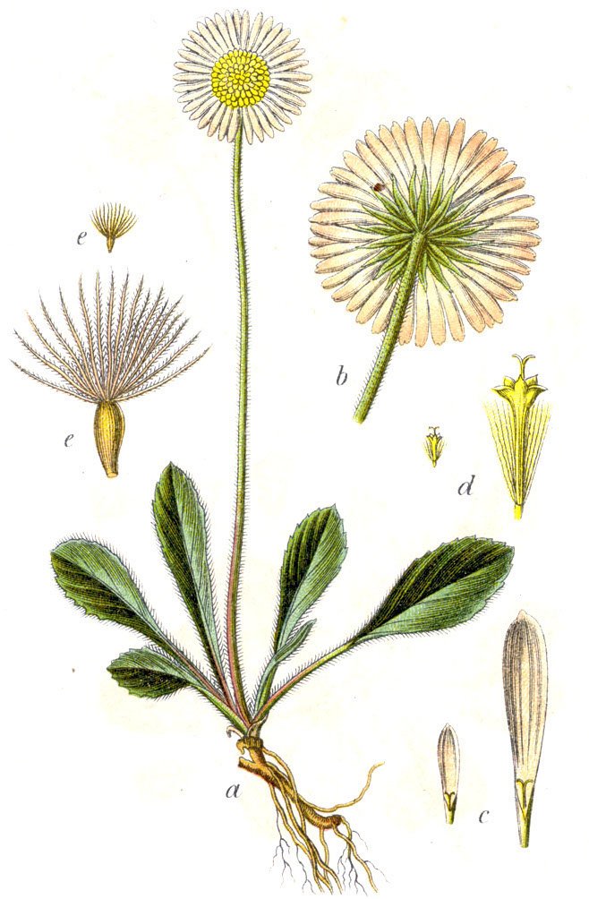 Aster bellidiastrum (L.) Scop., syn. Bellidastrum michelii Cass. Original Description Micheli-Massliebchen, Aster bellidiastrum